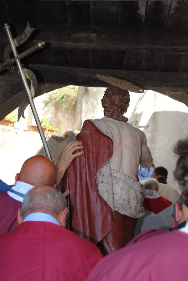 Il settecentesco simulacro ligneo è recato in processione tra gli storici vicoli del piccolo borgo montano di Acquafondata